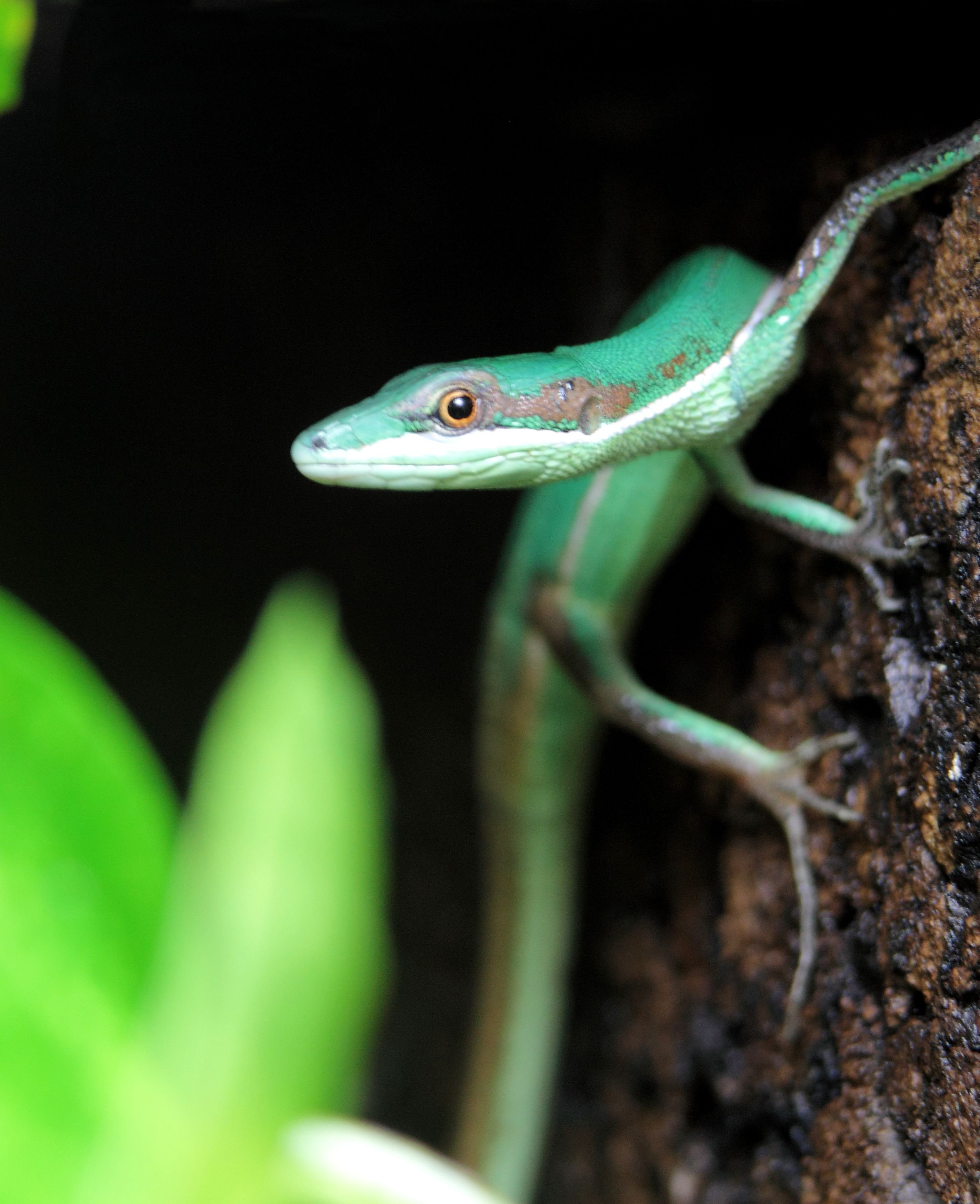 takydromus smaragdinus mâle